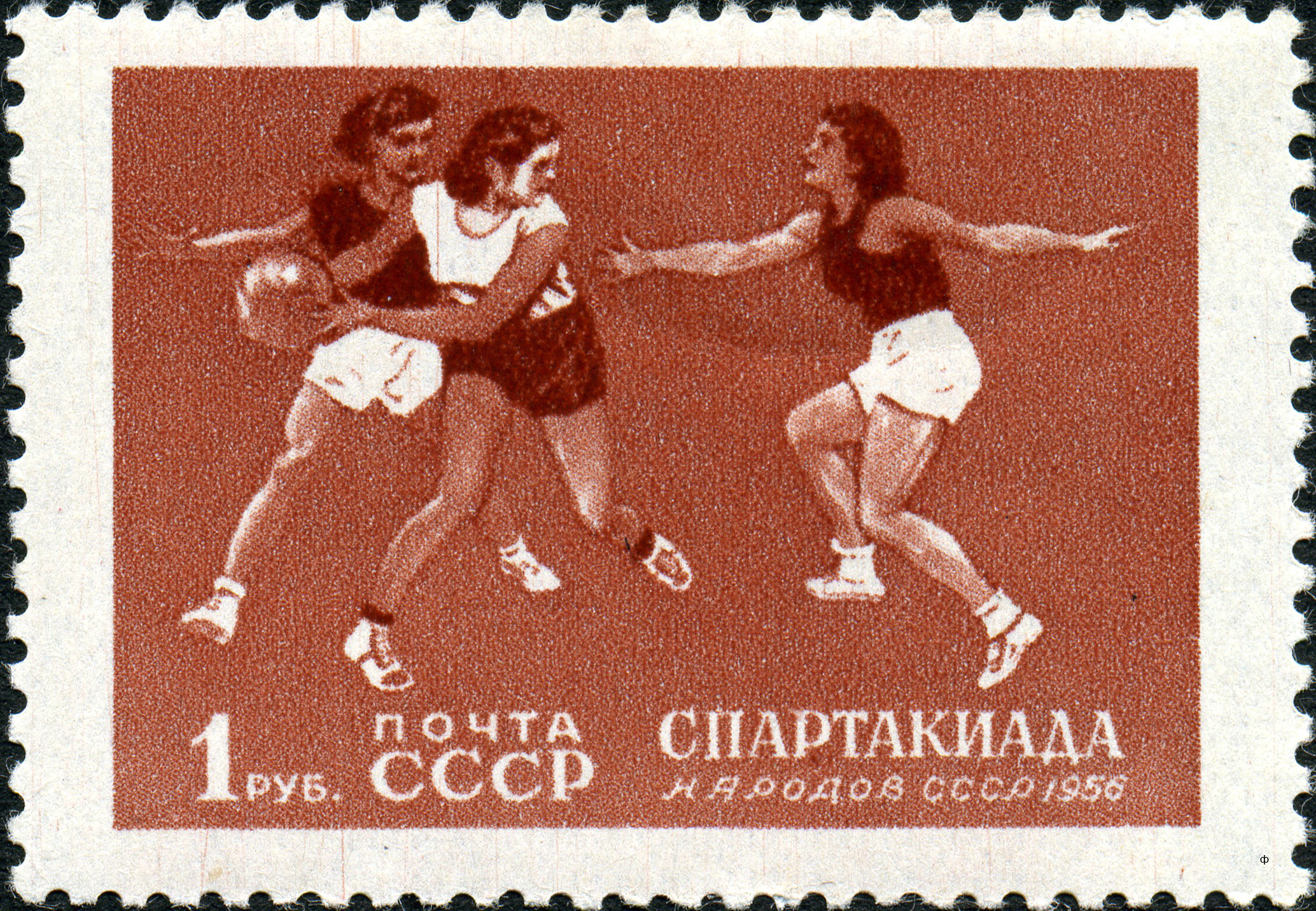 Марка СССР